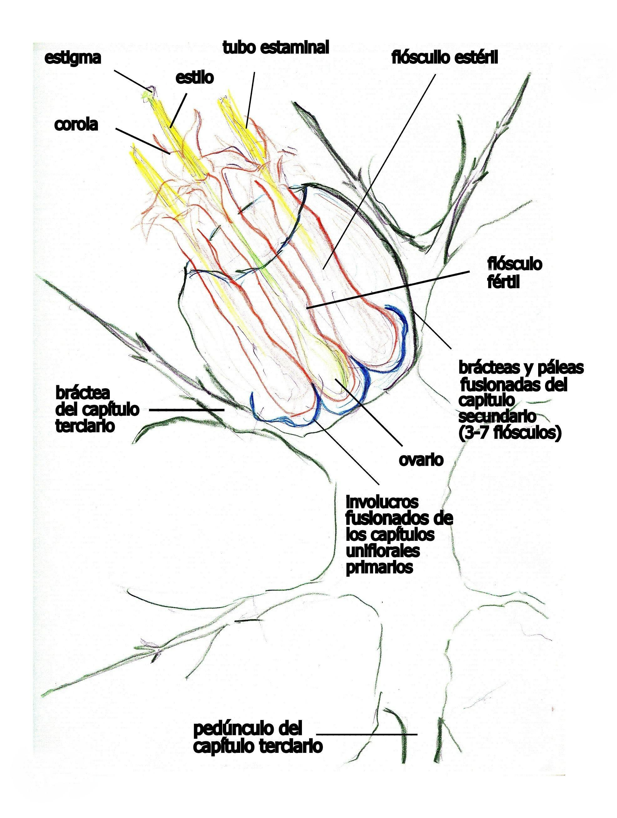 Gundelia : Organización muy esquemática de los 3 ordenes de capítulos de la sinflorescencia.